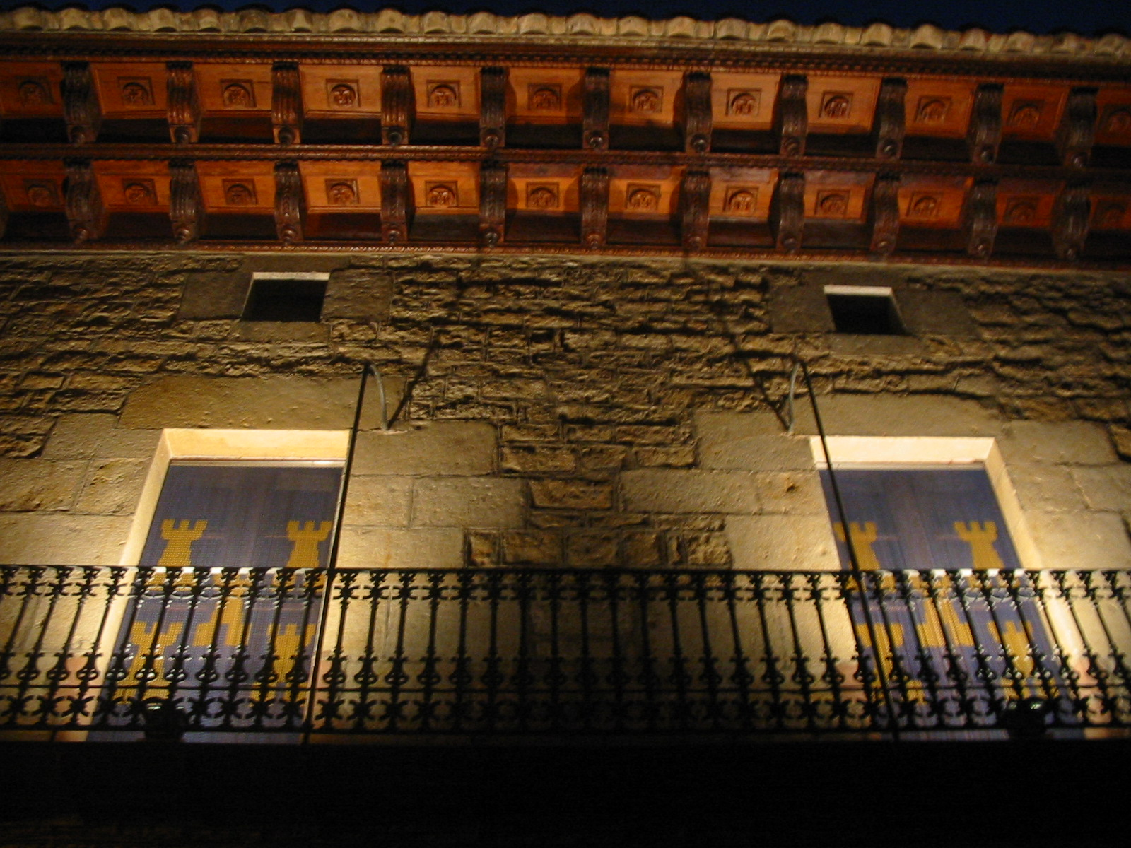 Ca Capellanets cuenta con un impresionante alero y portada de medio punto